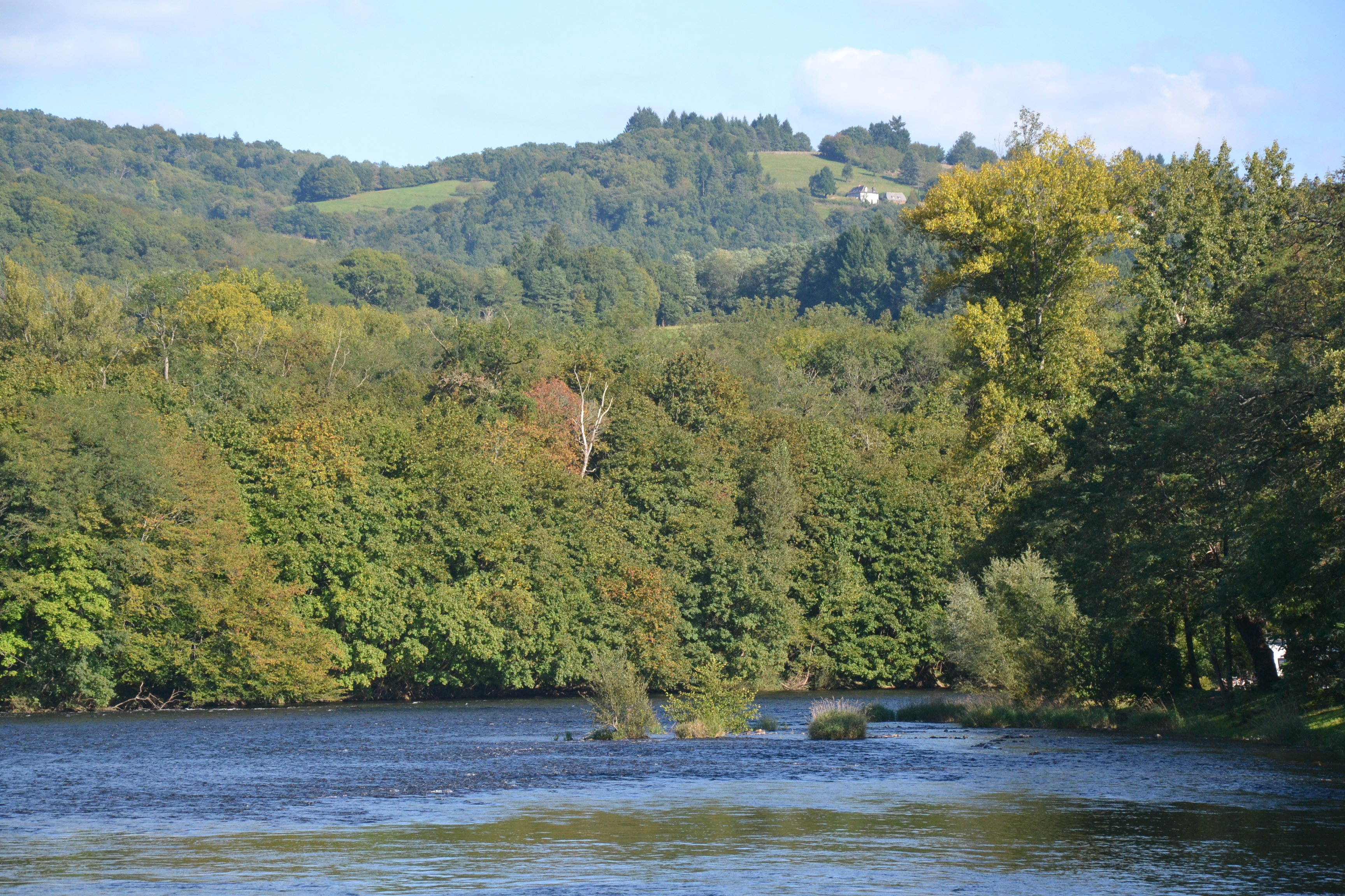 La Dordogne à Beaulieu-sur-Dordogne (Corrèze, France).